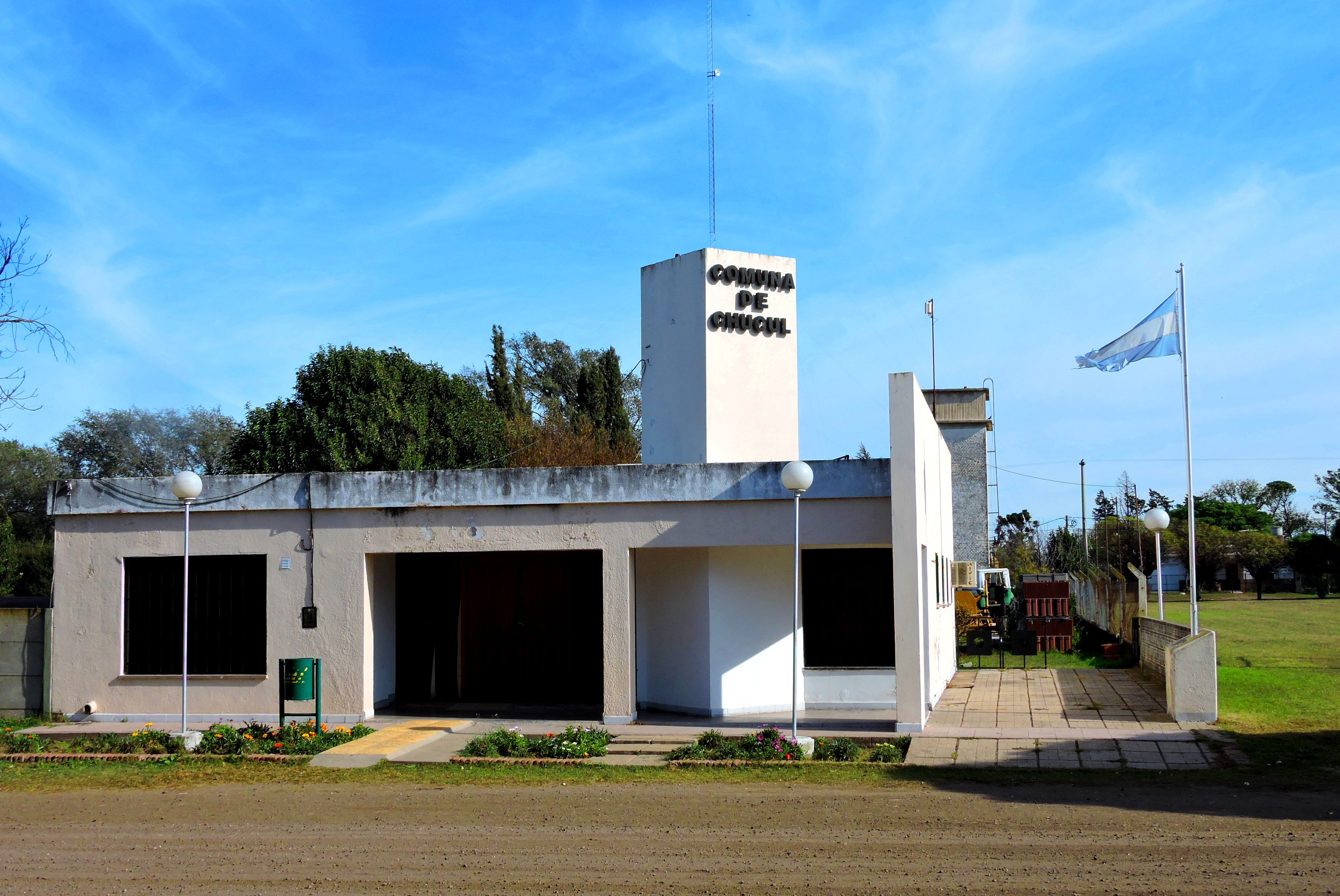 Edificio de la Comuna de Chucul.